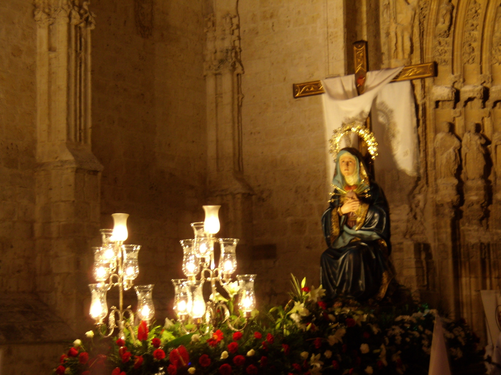 Virgen de los Siete Dolores, de Vicente Espinet (1906). Semana Santa en Palencia.